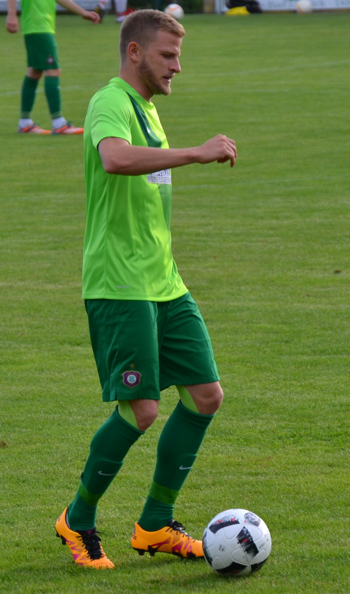 Nicky Adler beim Freundschaftsspiel von Erzgebirge Aue gegen den HFC Colditz im Juni 2016